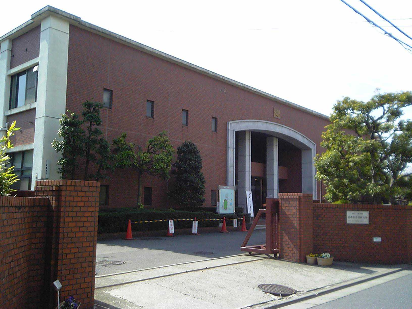 日本女子体育大学